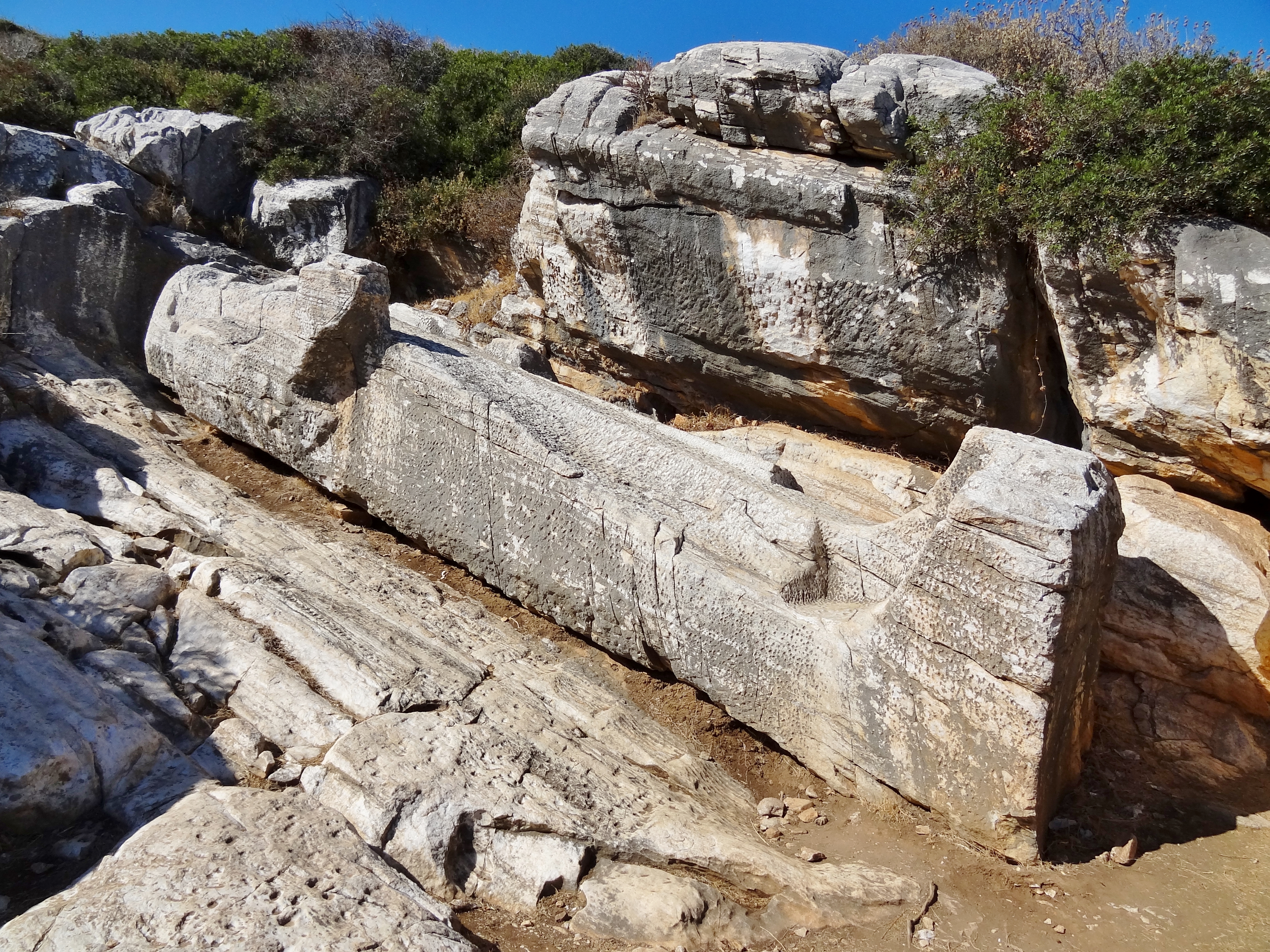 Kouros (Statue des Dionysos) oberhalb von Apollonas im Nordosten von Naxos, Kykladen, Griechenland